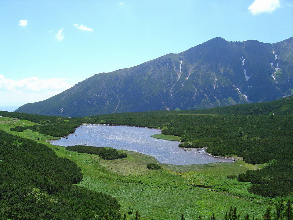 Velke Biele pleso in Dolina Bielych plies